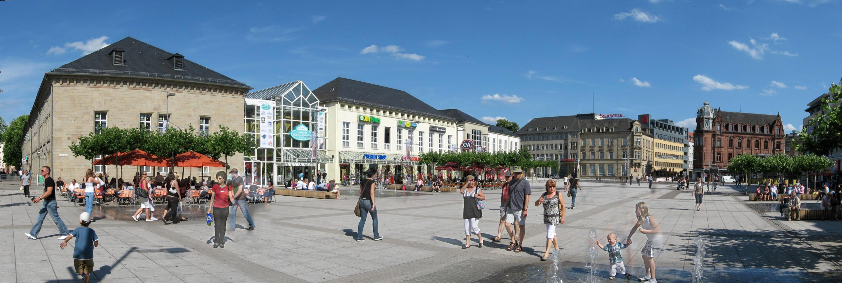 Saarlouis, Blick auf Galerie